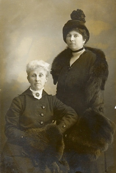 София Карловна Буксгевден с матерью Людмилой Петровной Осокиной (1858-1917)